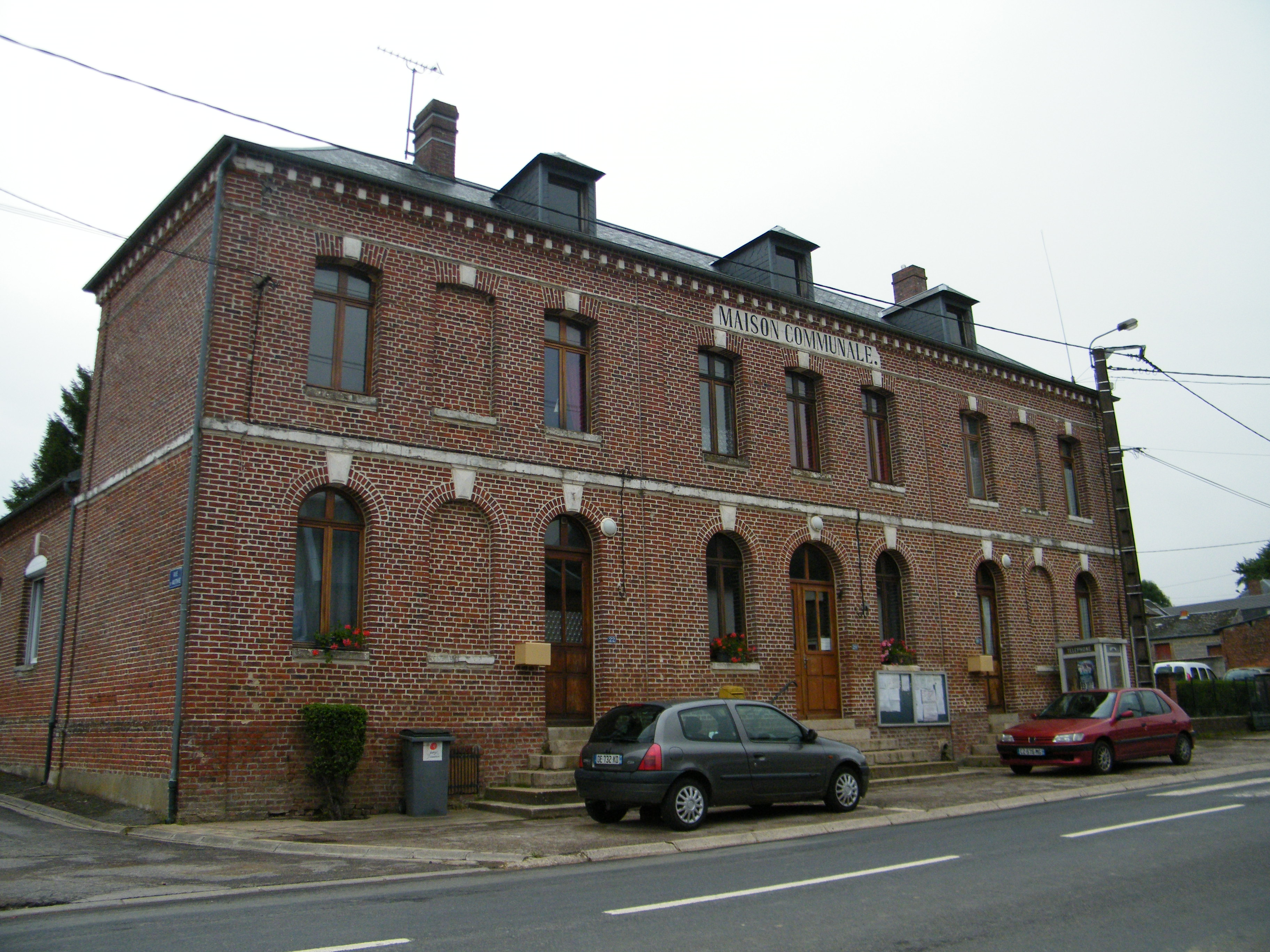 Maison communale.